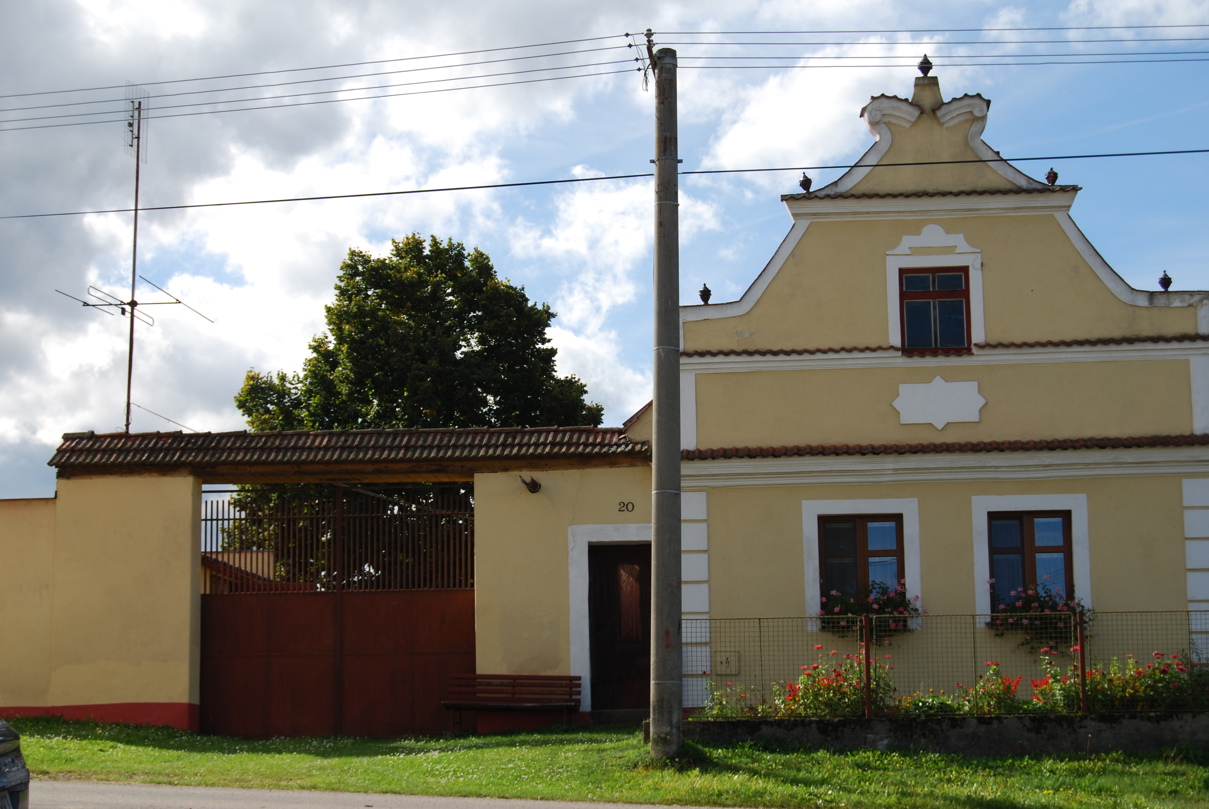 Usedlost čp. 20 v obci. Rataje (okres Tábor). Česká republika.